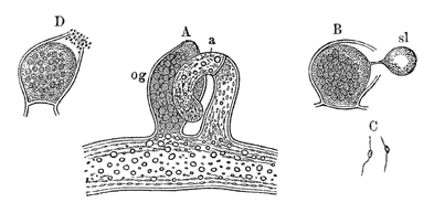 Befruchtung von Vaucheria A – Stück der Schlauchzelle mit Antheridium (a) und Oogonium (og) B – geöffnetes Oogonium, das einen Schleimtropfen (sl) ausstößt C – die mit zwei Wimpern versehenen Spermatozoiden D – Ansammlung der Spermatozoiden am Eingang der Oogonien